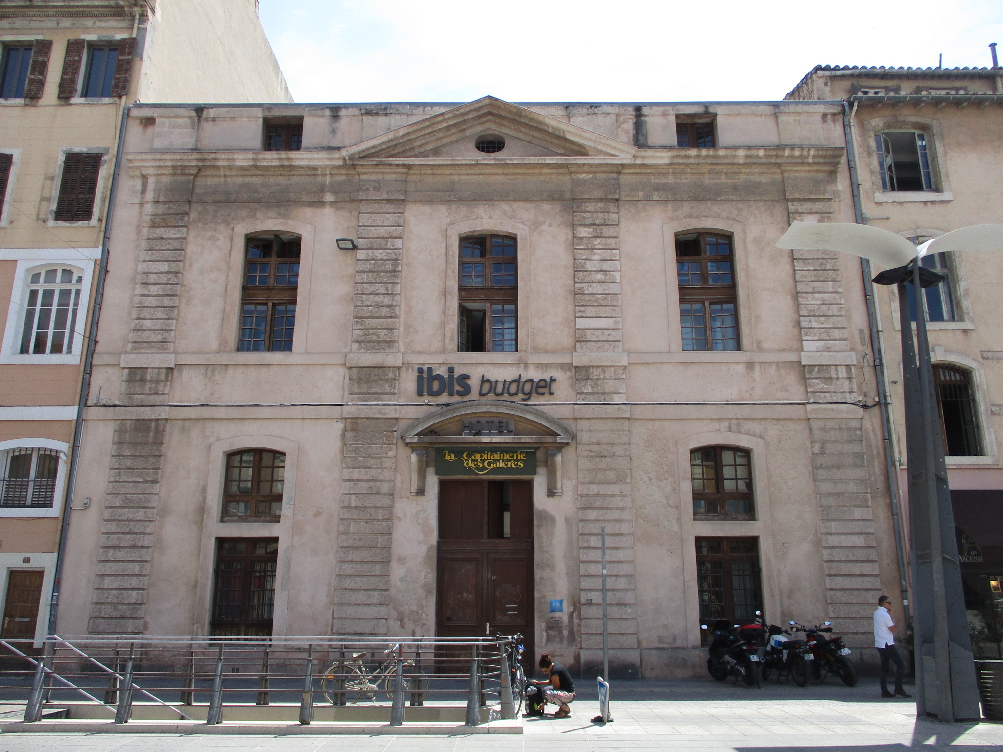 Cours Honoré-d'Estienne-d'Orves